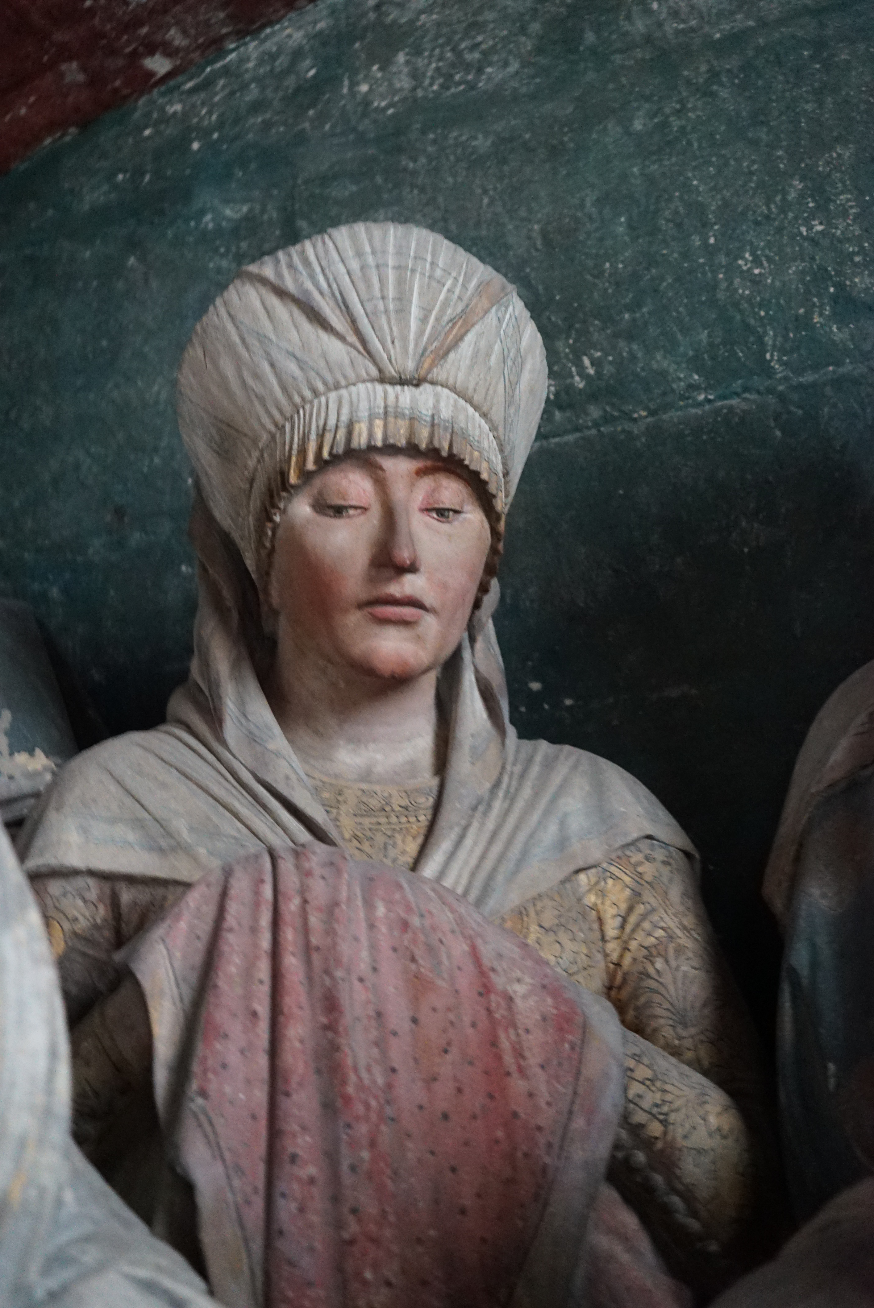 Catherine de Saint-Belin ? personnage de la mise au tombeau vue de l'intérieur de la chapelle.